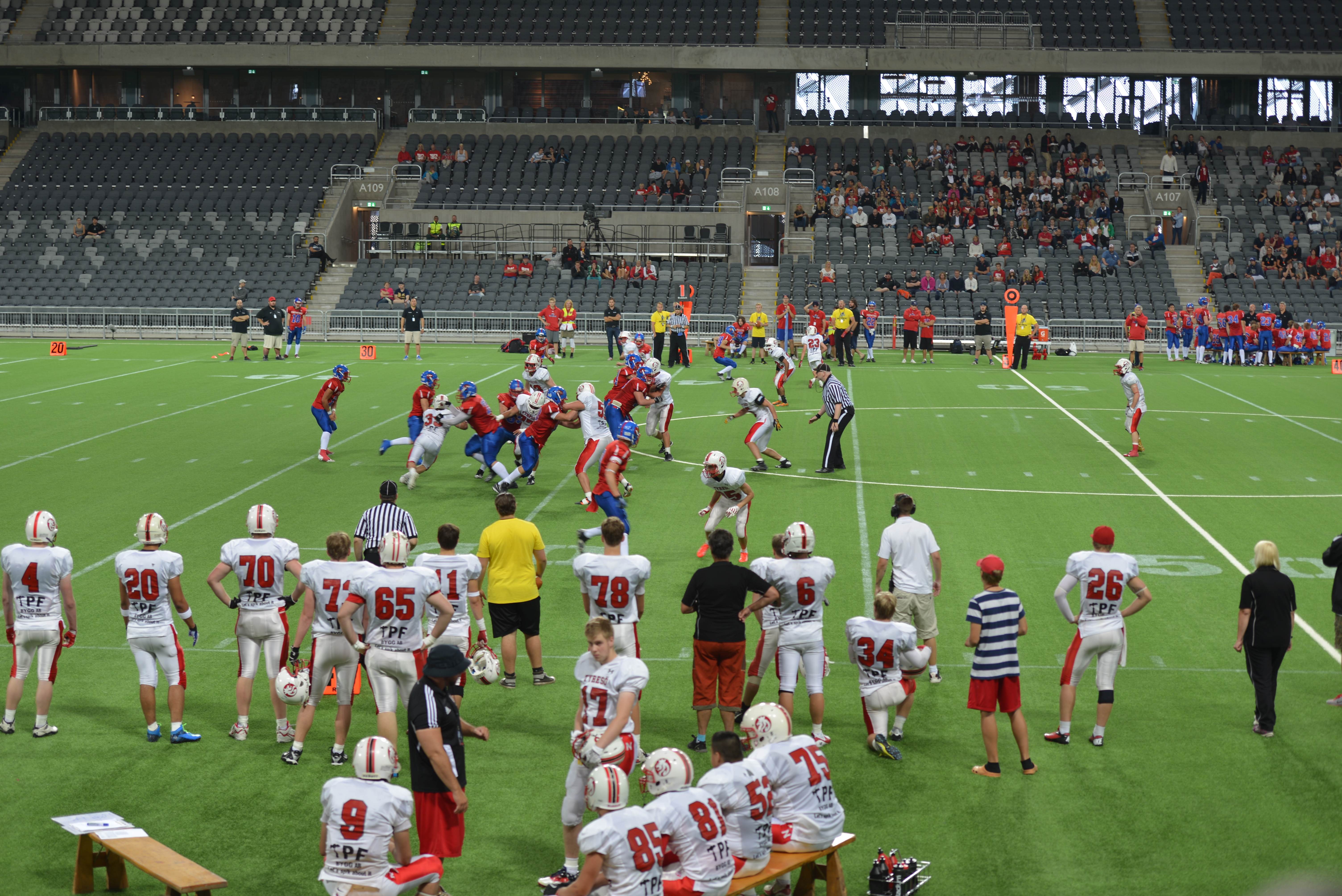 U19 SM-final i amerikansk fotboll mellan Tyresö och Kristianstad.